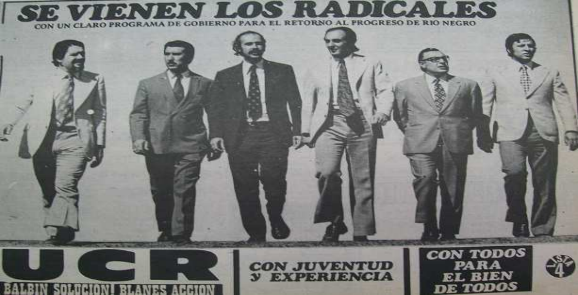 Propaganda radical para las elecciones provinciales de Río Negro, Argentina, 1973